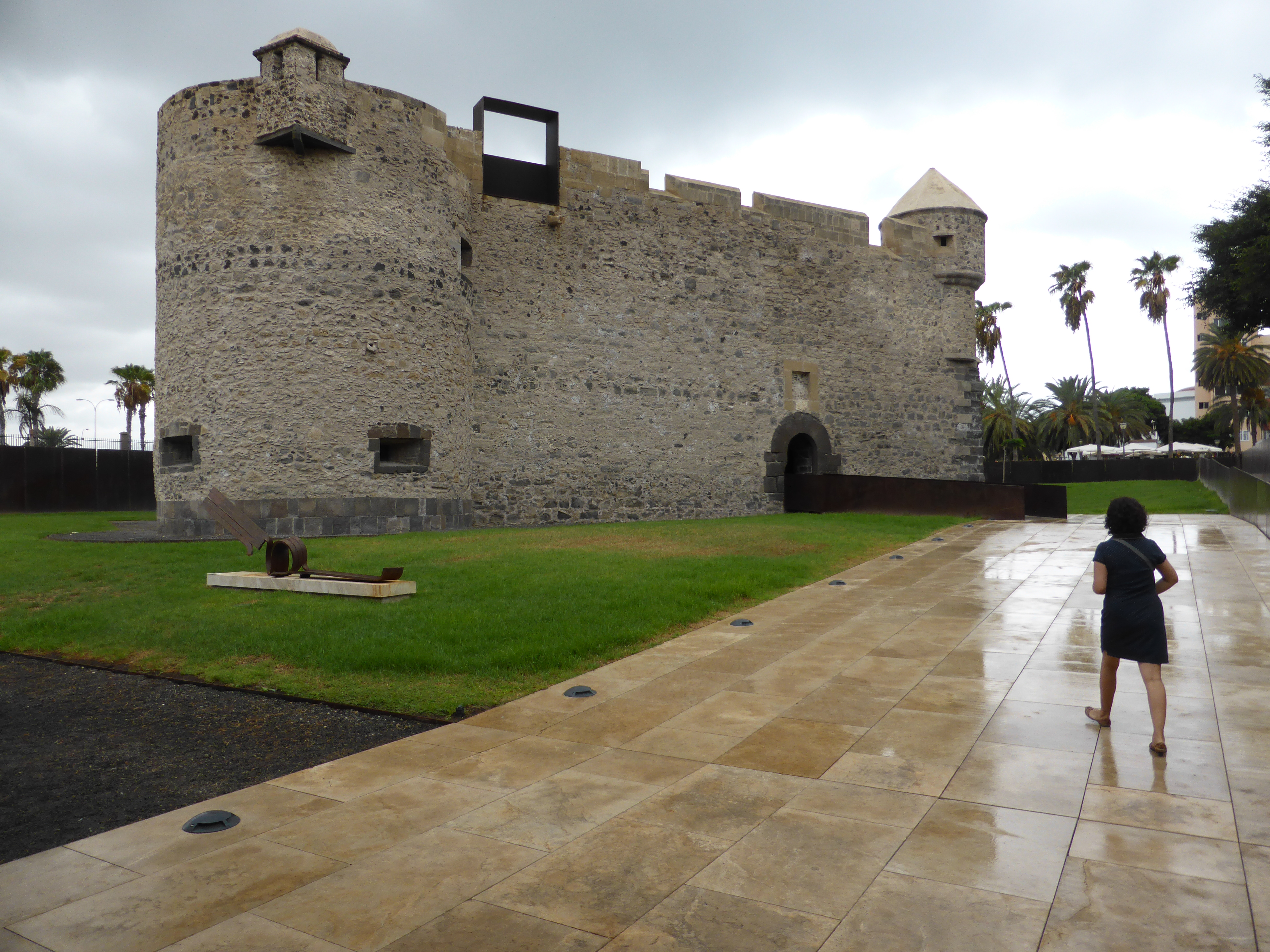 Fue el primer castillo construido en la isla de Gran Canaria, a finales del siglo XV. Tuvo reformas en los siglos posteriores.